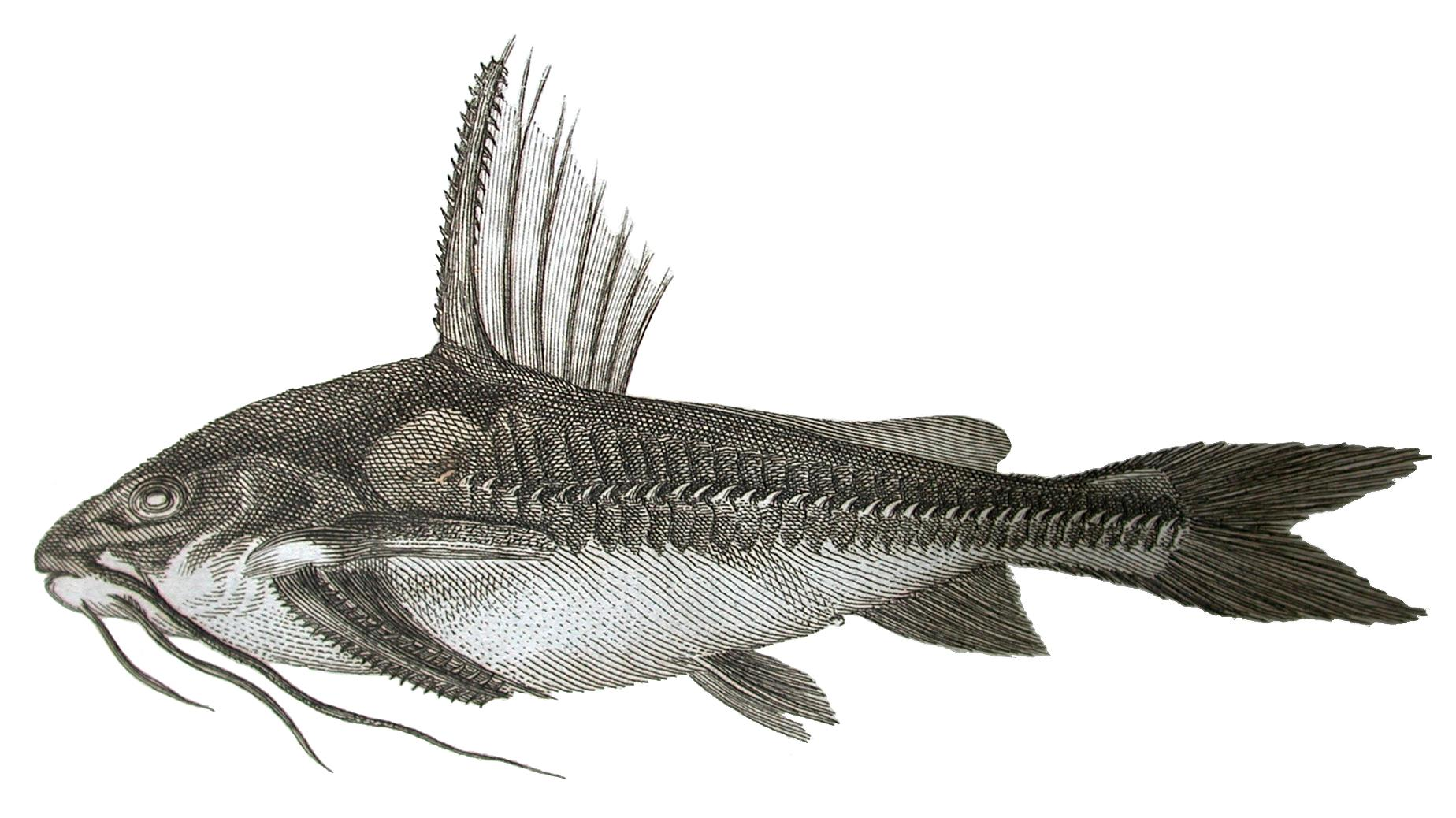 "Silurus costatus", jetzt Platydoras costatus, Darstellung von Gronow 1754